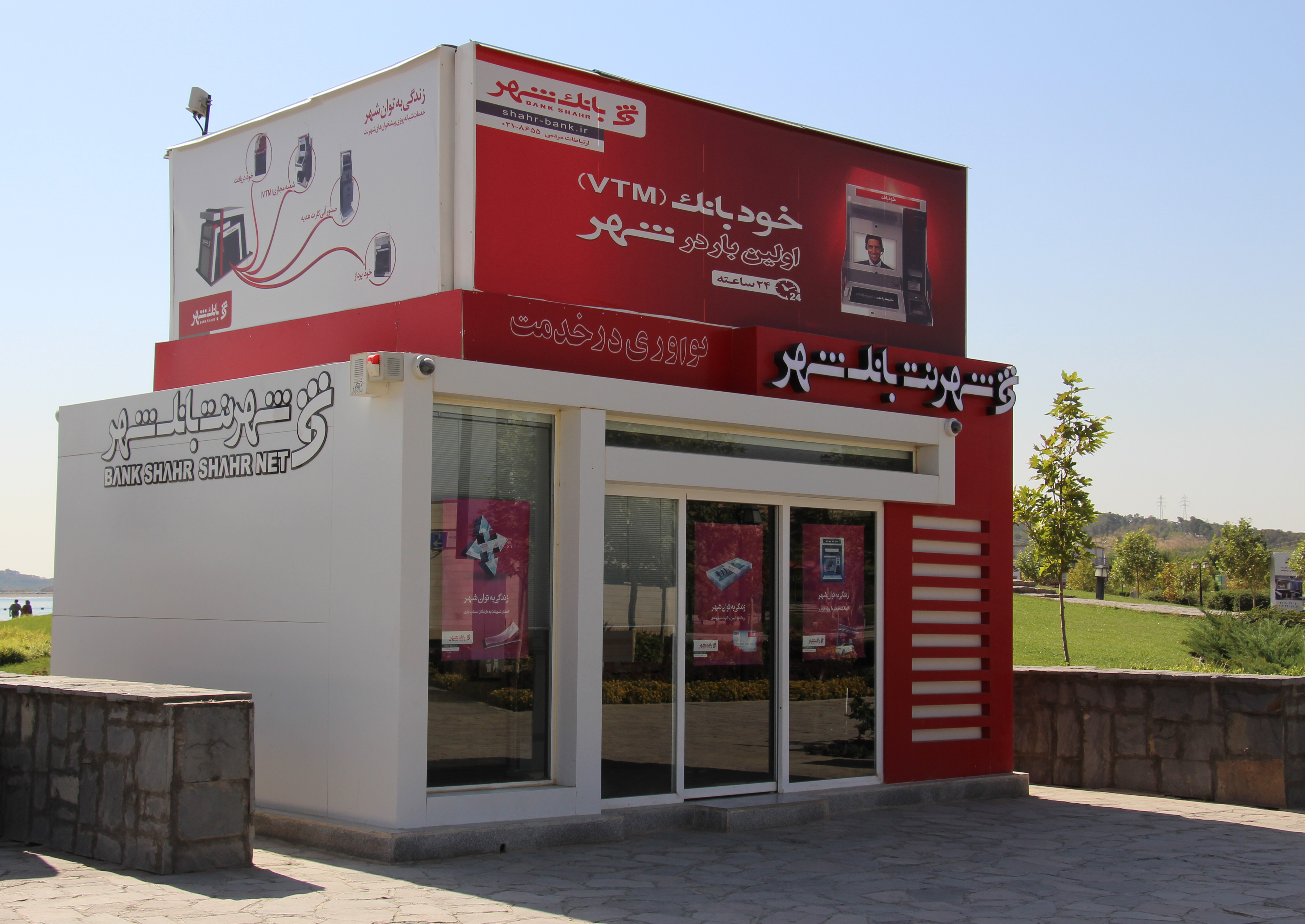 شهرنت